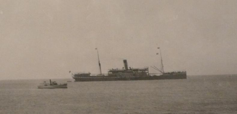 Der Reichspostdampfer KRONPRINZ vor Lourenco Marques 1916